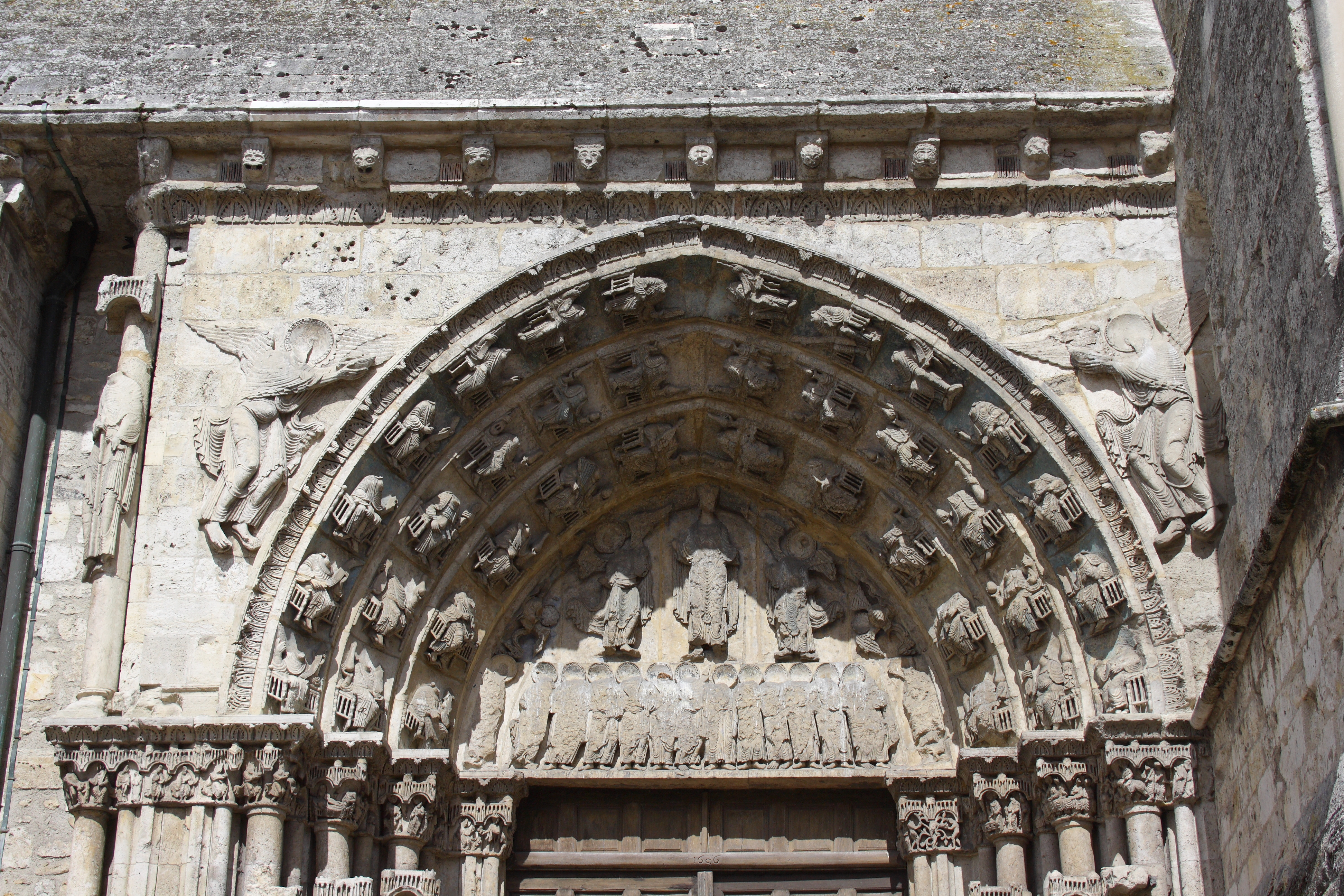 Katholische Pfarrkirche Notre-Dame-du-Fort in Étampes im Département Essonne in der Region Île-de-France (Frankreich), Südportal um 1150, Tympanon und Archivolten Object location48° 26′ 05.89″ N, 2° 09′ 51.01″ E